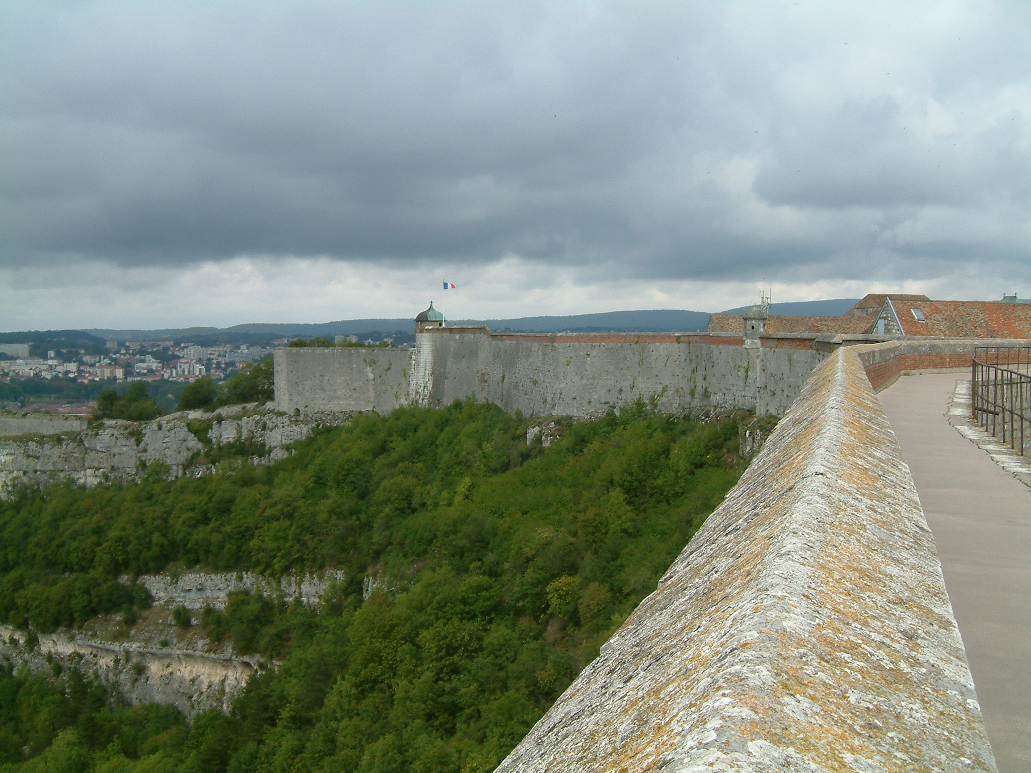 Citadelle de Besançon, vue sur les murailles de la citadelle. A l'extrémité, on peut discerner la tour de la Reine. Besançon, Franche-Comté, FRANCE